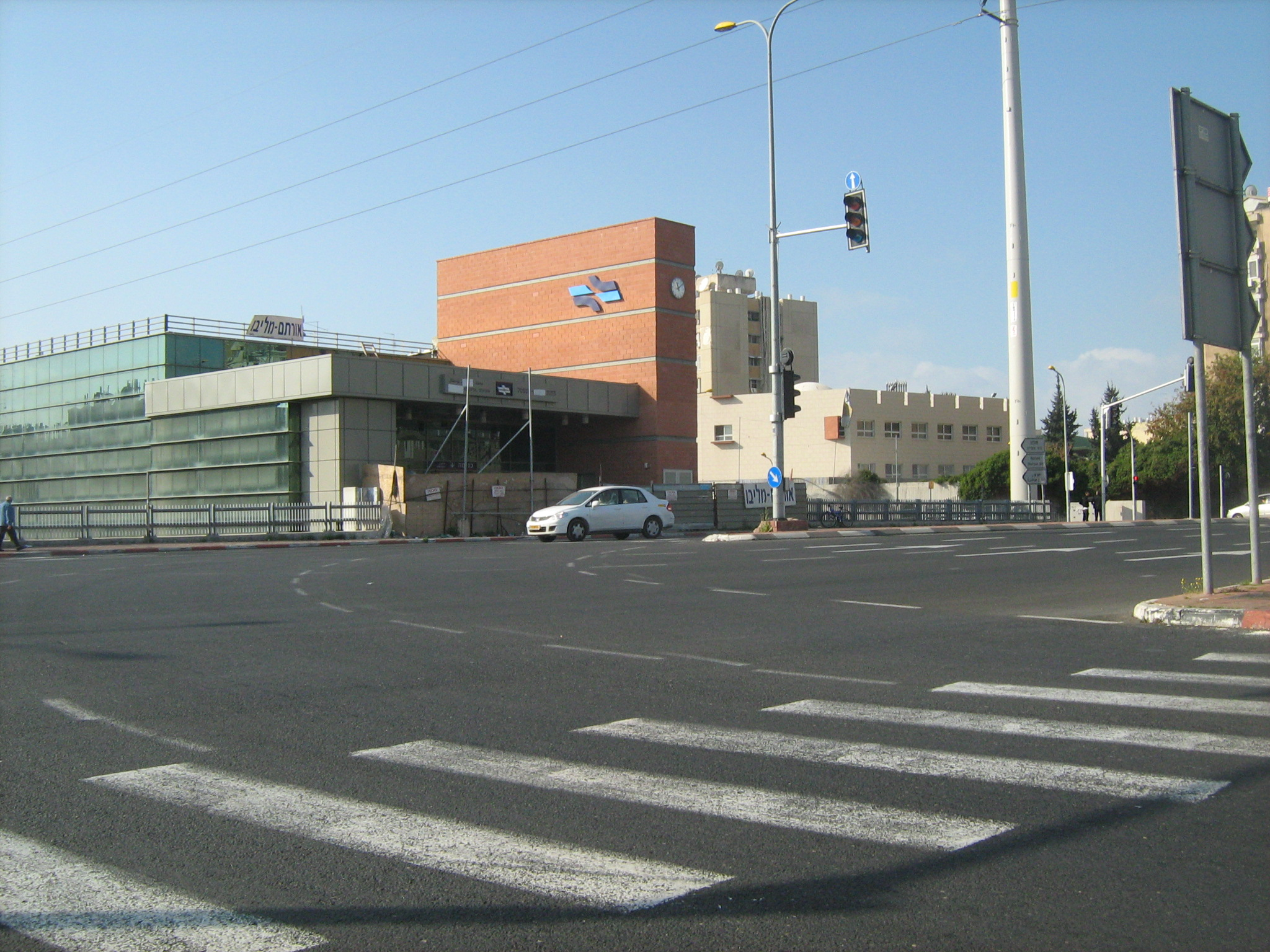 תחנת הרכבת יוספטל, פברואר 2009